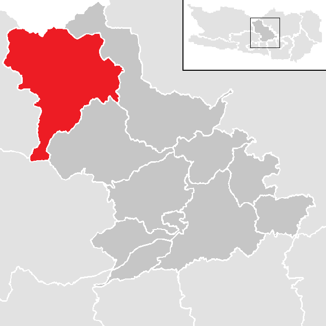 Bezirk Feldkirchen